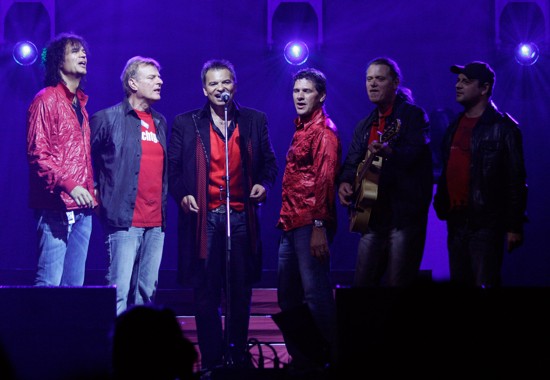 Die Klostertaler beim 2. Jubiläumsfest der Volksmusik Superstars in der Wiener Stadthalle.